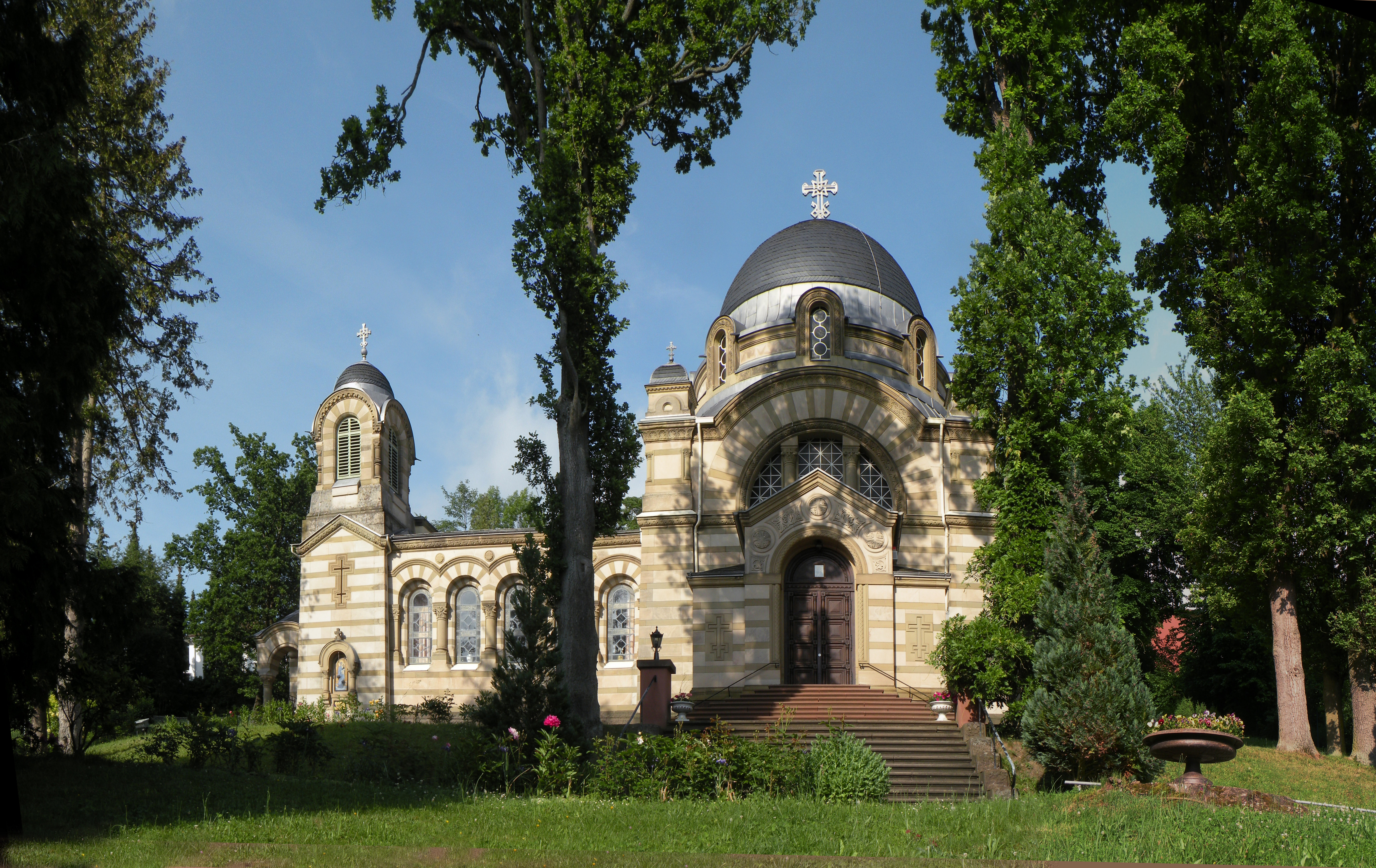 Руская церковь.Арх.Шрётер.